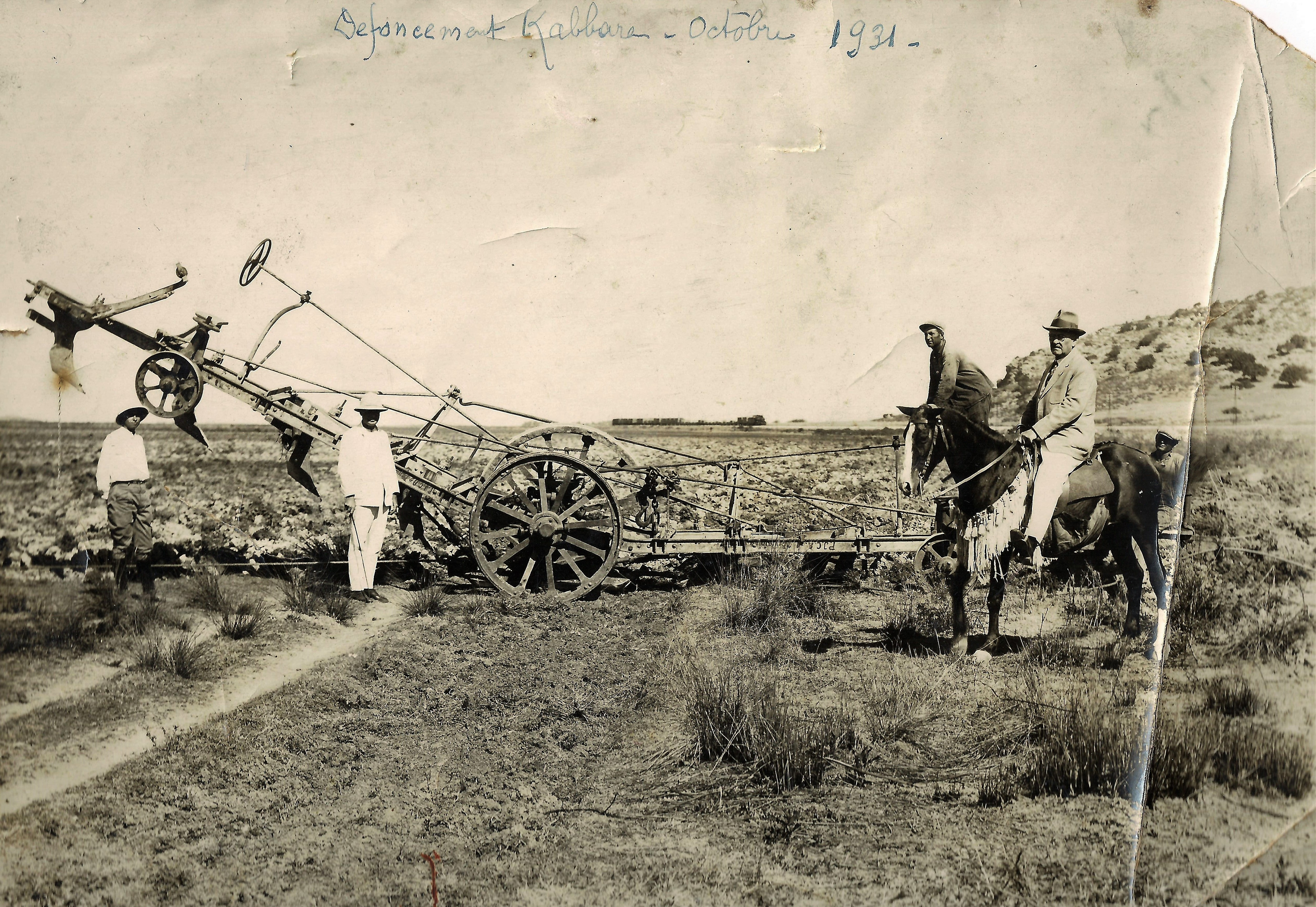 רפאל קוהן, כפקיד בכיר של פיק"א והברון רוטשילד היה ממונה על מפעל יבוש הביצות בכברה. כאן הוא מצולם על סוסו בעת ביקור לפיקוח על העבודות, אוקטובר 1931